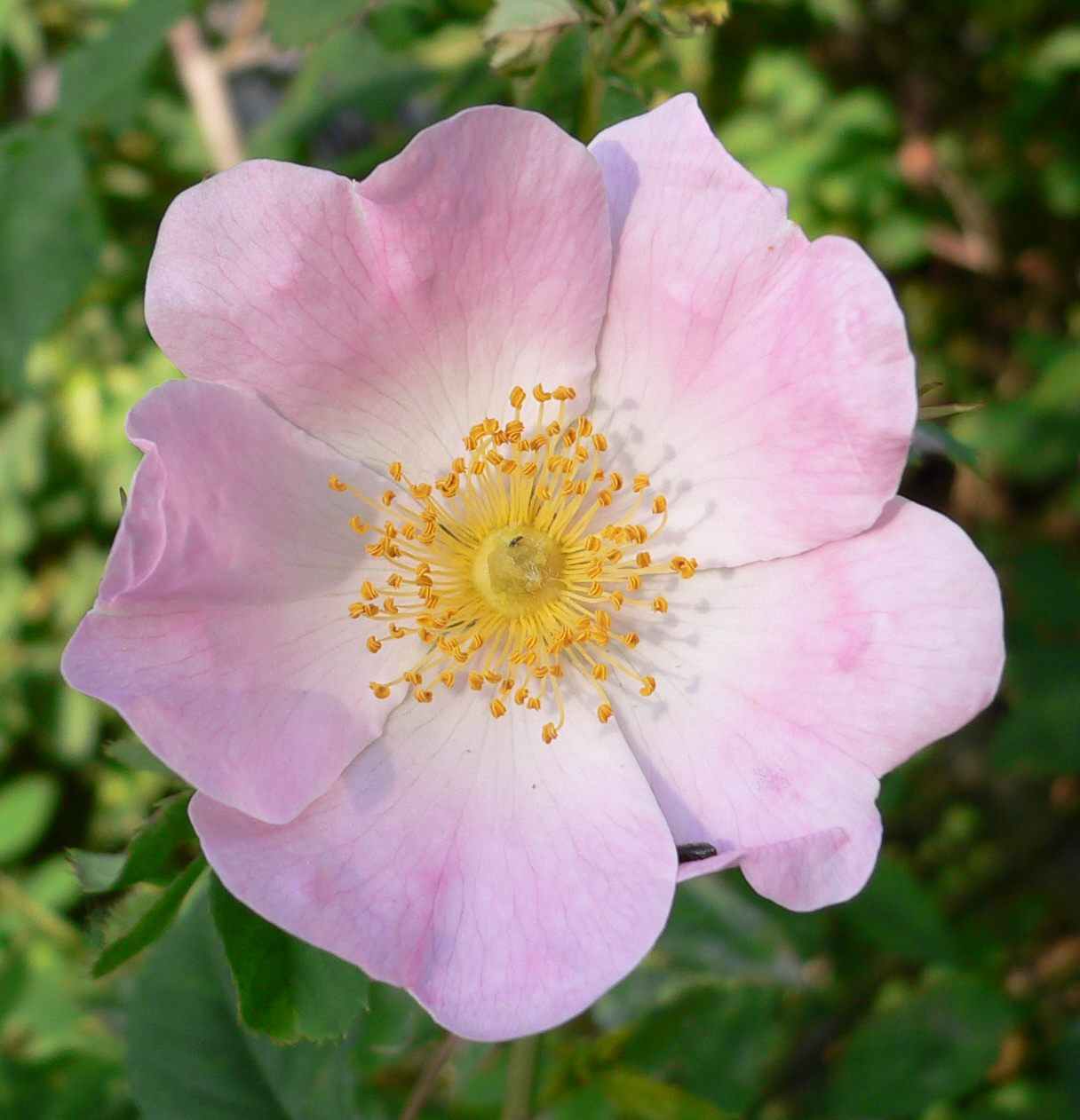 Rosa Hagebuttenblüte, Görlitzer Park, Berlin-Kreuzberg